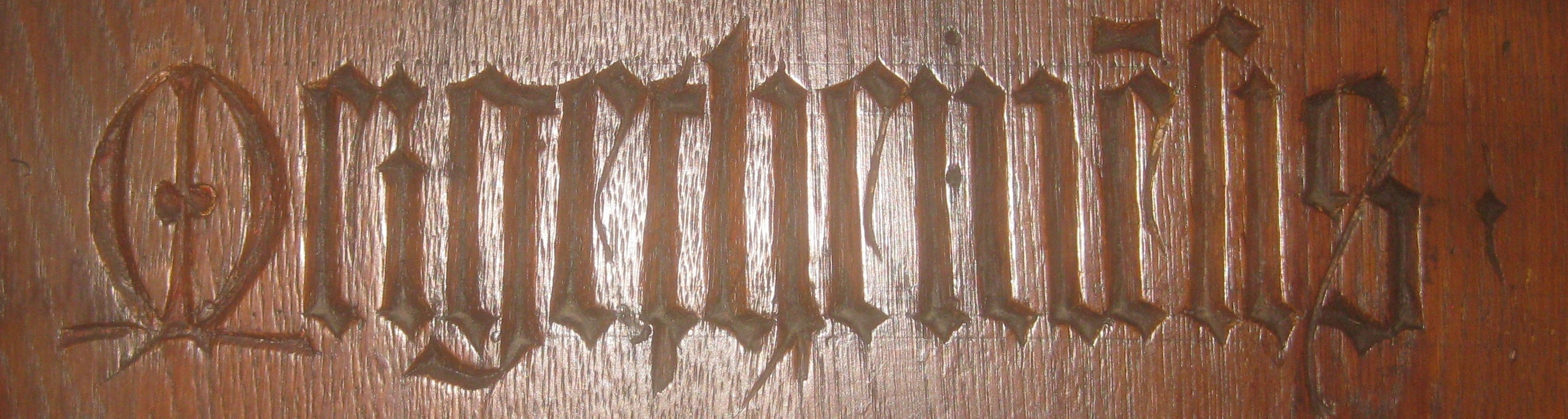 Chorgestühl der Leonhardskirche, Südostfassade, vordere Sitzreihe, rechte Hälfte, Inschrift „Mergethemēsis“ (ē = en, Mergentheim) an der Rücklehne von Sitz 6.